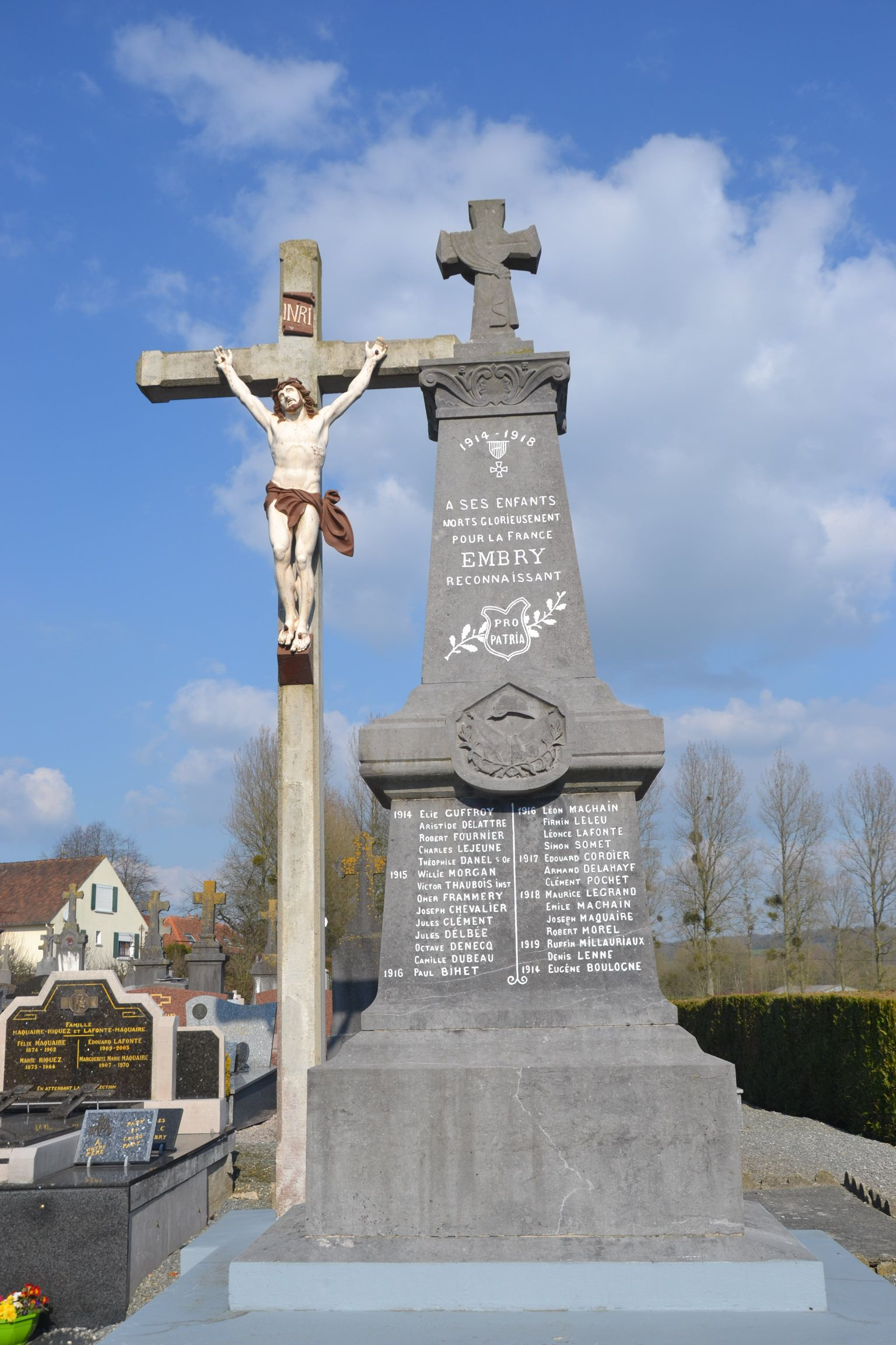 Monument aux morts d'Embry et calvaire, dans le cimetière entourant l'église d'Embry